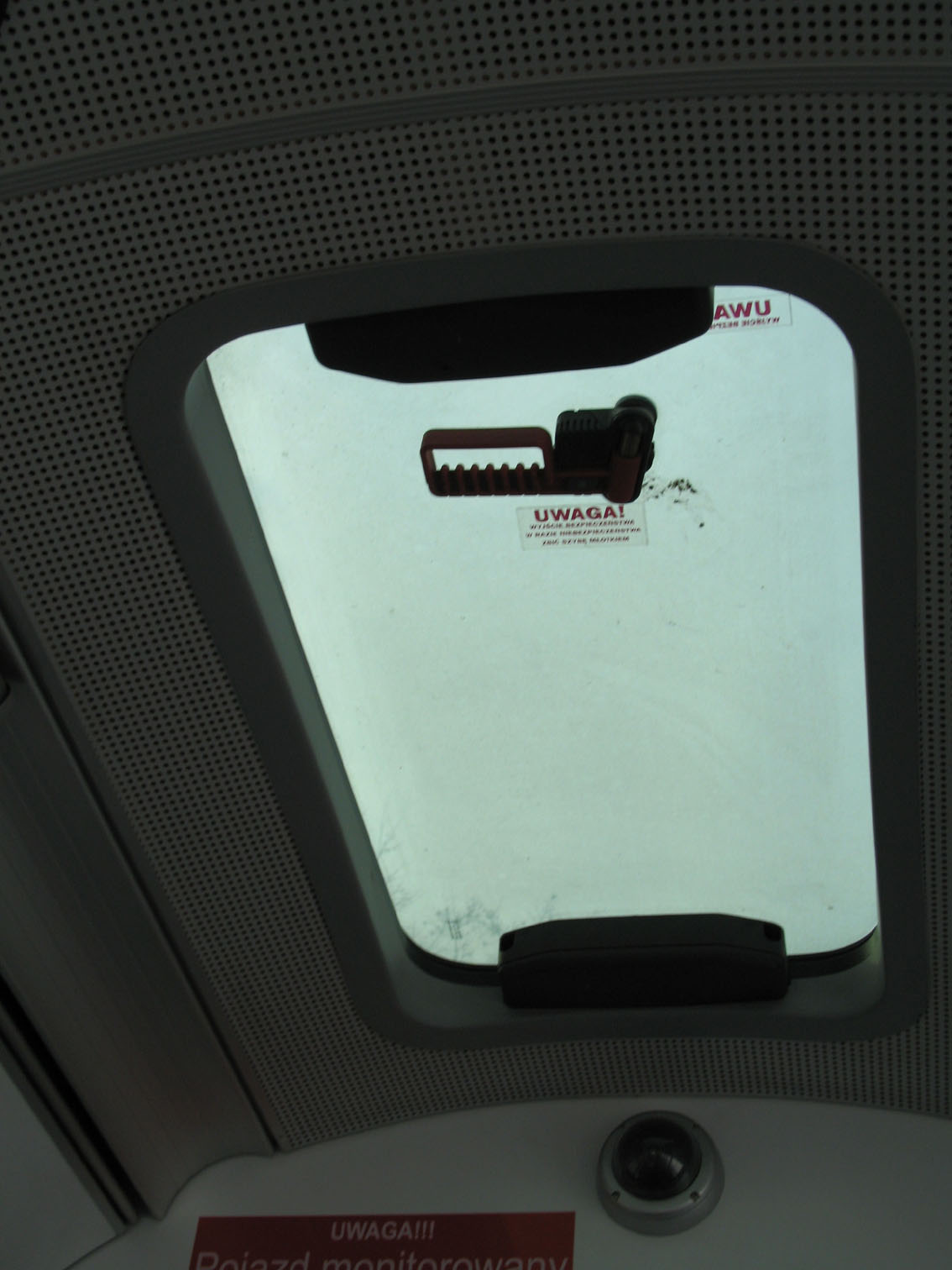 Okno dachowe w autobusie Solaris Urbino III generacji.